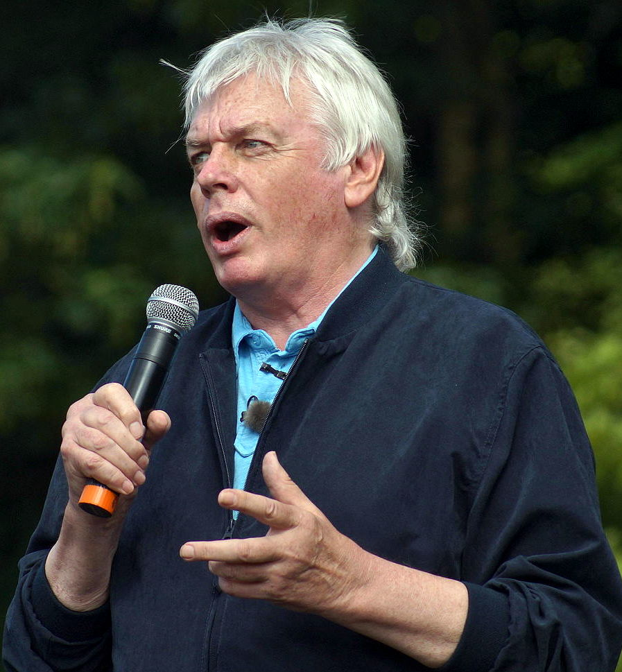 David Icke